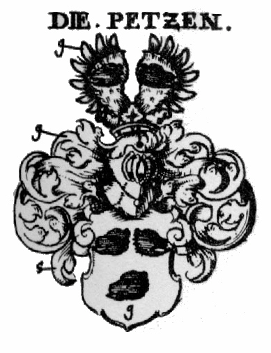 Wappen der Nürnberger Gerichtsfähigen Familie Petz von Lichtenhof